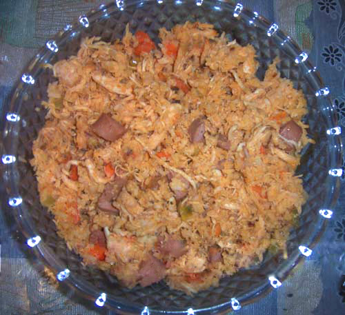 Cuisine of Nicaragua, Arroz a la Valenciana